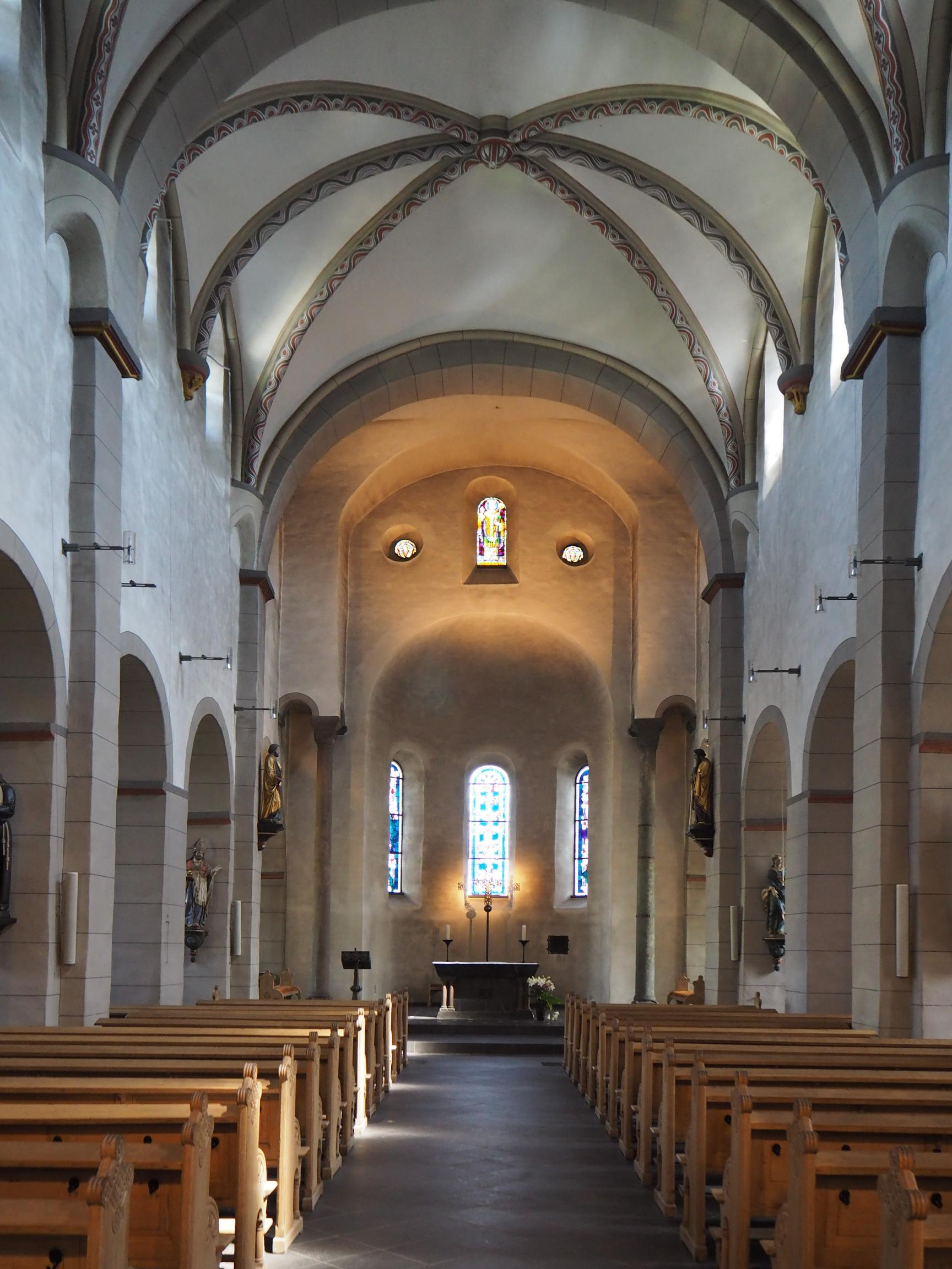 Wipperfürth (NRW),Kirche St. Nikolaus, Mittelschiff Foto: Juli 2015